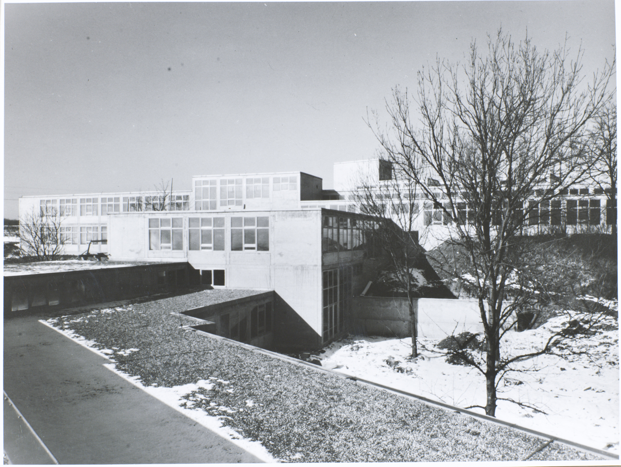 Hochschule für Gestaltung (HfG) Ulm / Ulm School of Design (1953-1968). Architekt: Max Bill.